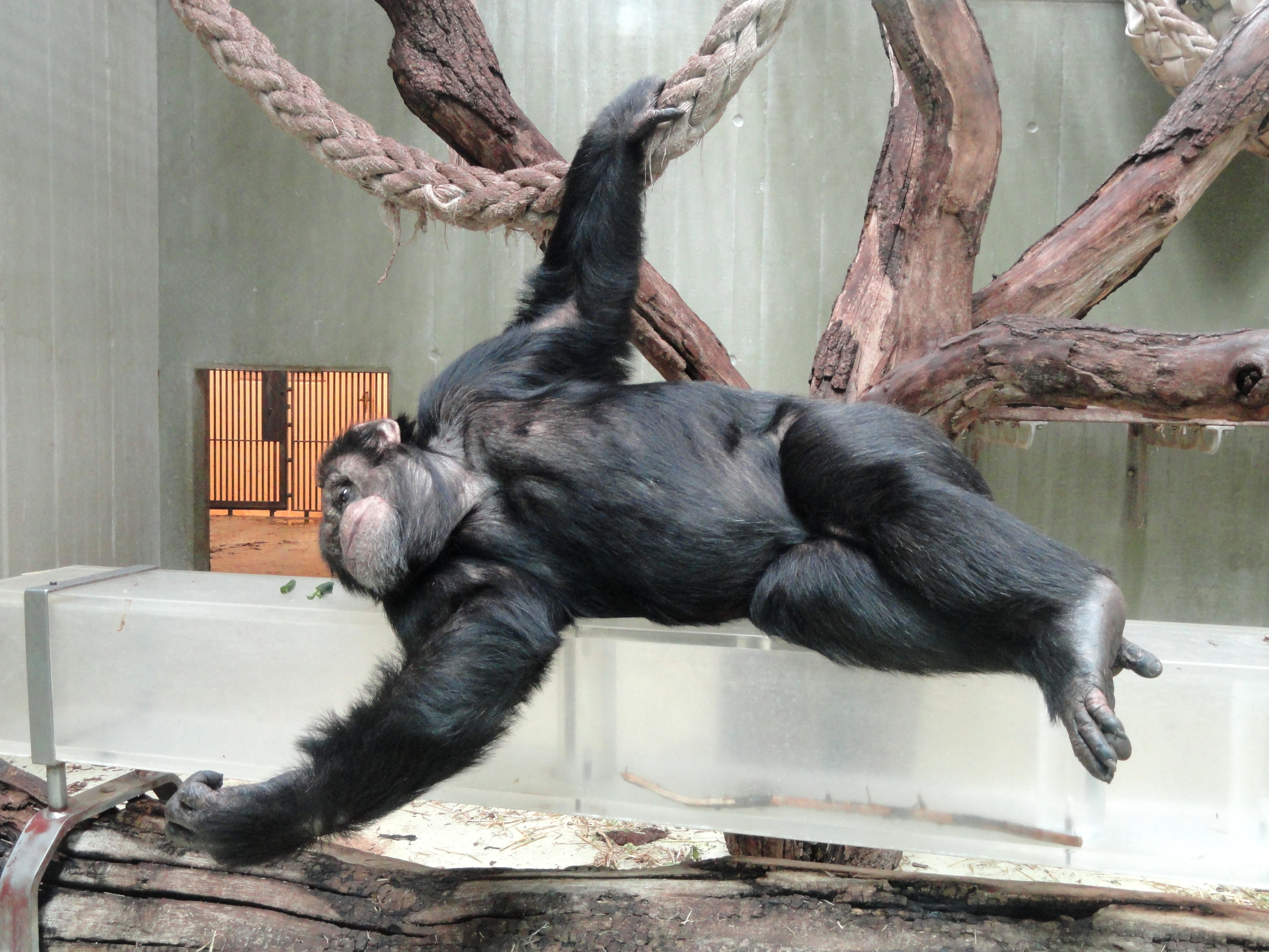 Copenhagen Zoo, Frederiksberg, Copenhagen, Denmark.